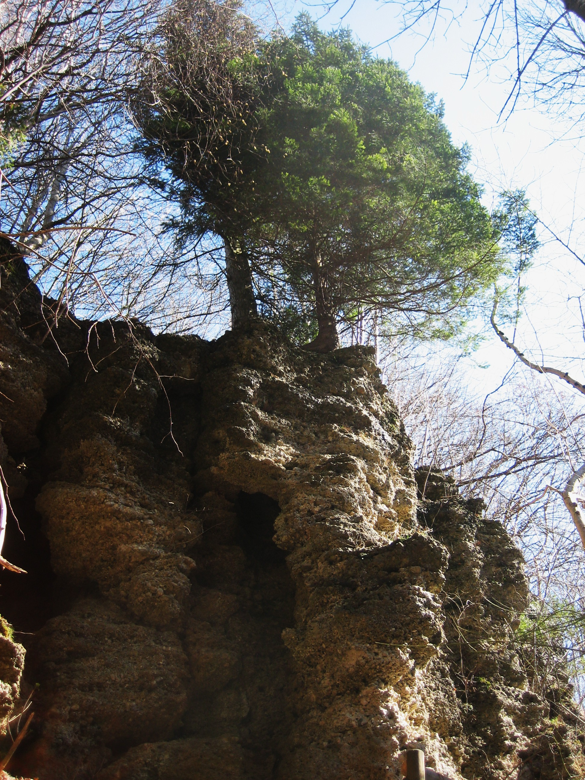 Geologische Orgeln, zwischen Ottobeuren und Wolfertschwenden, nordöstlich von Niederdorf, im Landkreis Unterallgäu, Bayern